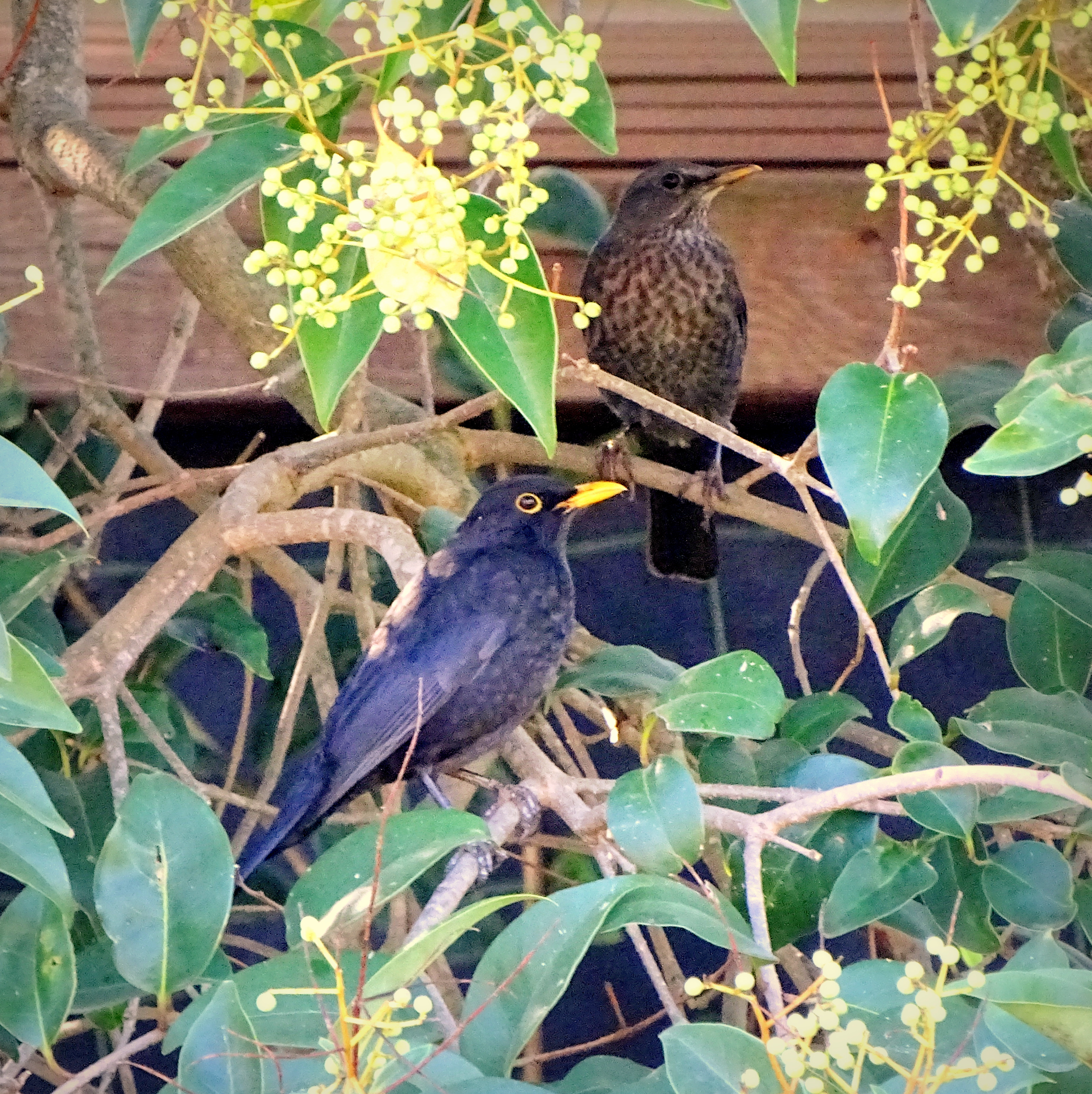 Turdus merula, male e female